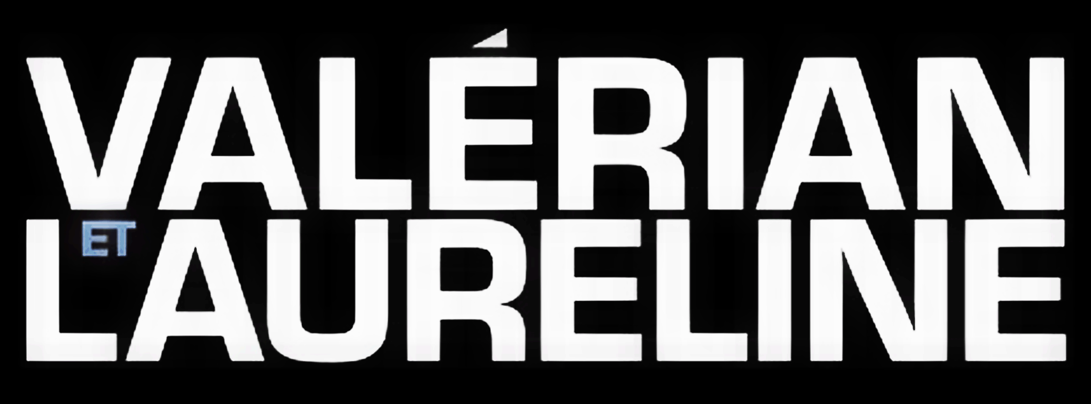 Logo de Valérian et Laureline tel que représenté dans la collection Intégrales